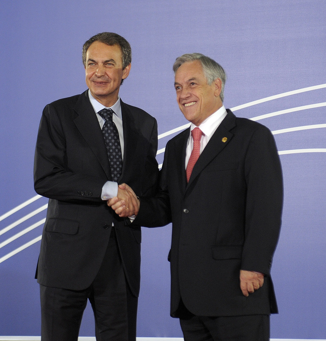 Sebastián Piñera and José Luis Rodríguez Zapatero.